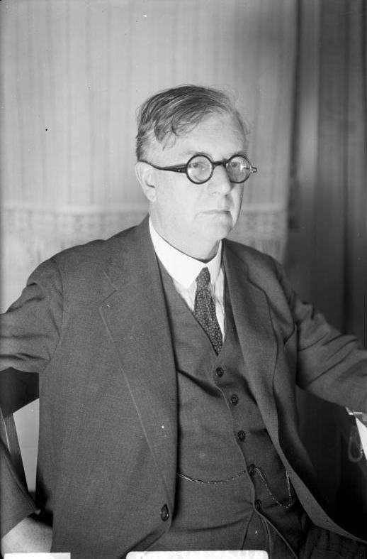 Richard Wilhelm Prof. Richard Wilhelm Abgebildete Personen: Wilhelm, Richard Prof. Dr.: Ordinarius für Chinakunde und Chinaforschung an der Universität Frankfurt/Main, Deutschland ( GND 118771876 )